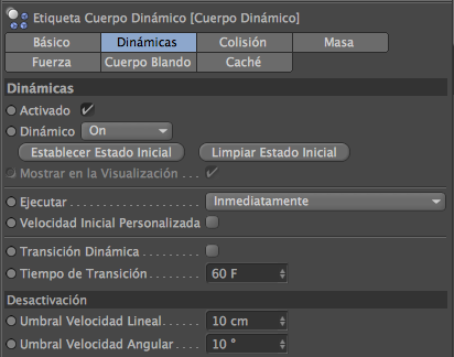 Configuración de etiqueta de cuerpo dinámico